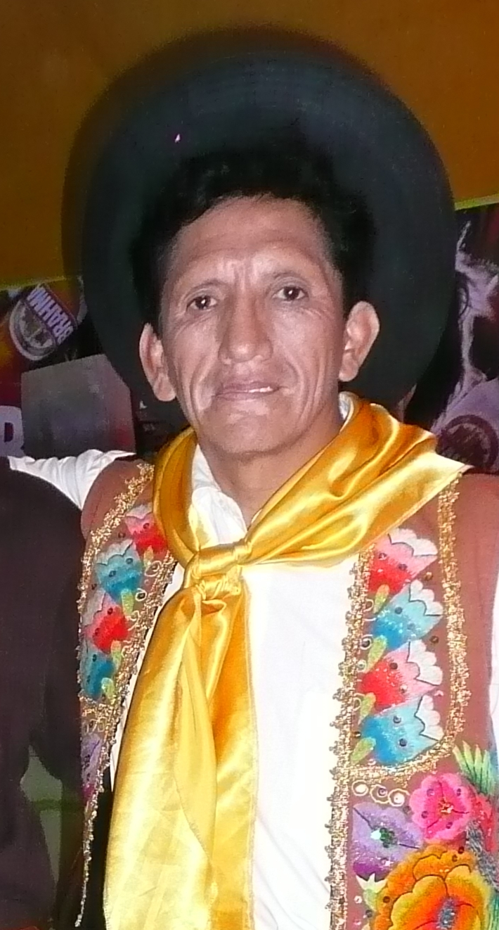 Eduardo Cesti (Cervera), Freddy Montesa (Cecilio) y Eusebio "Chato" Grados (como el mismo) en un descanso en la grabacion de la miniserie peruana "Sally, la muñequita del pueblo"